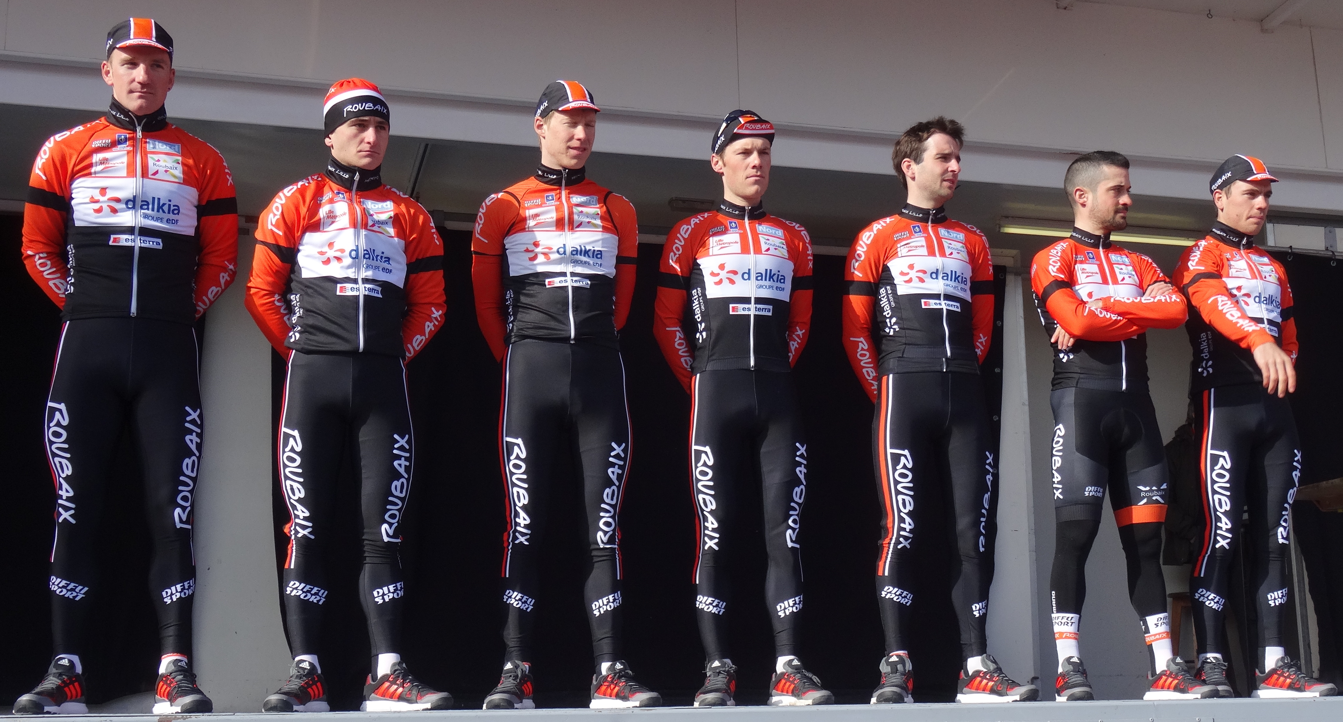 Reportage réalisé le mercredi 4 mars à l'occasion du départ du Samyn des Dames 2015 et du Samyn 2015 à Quaregnon, Belgique.